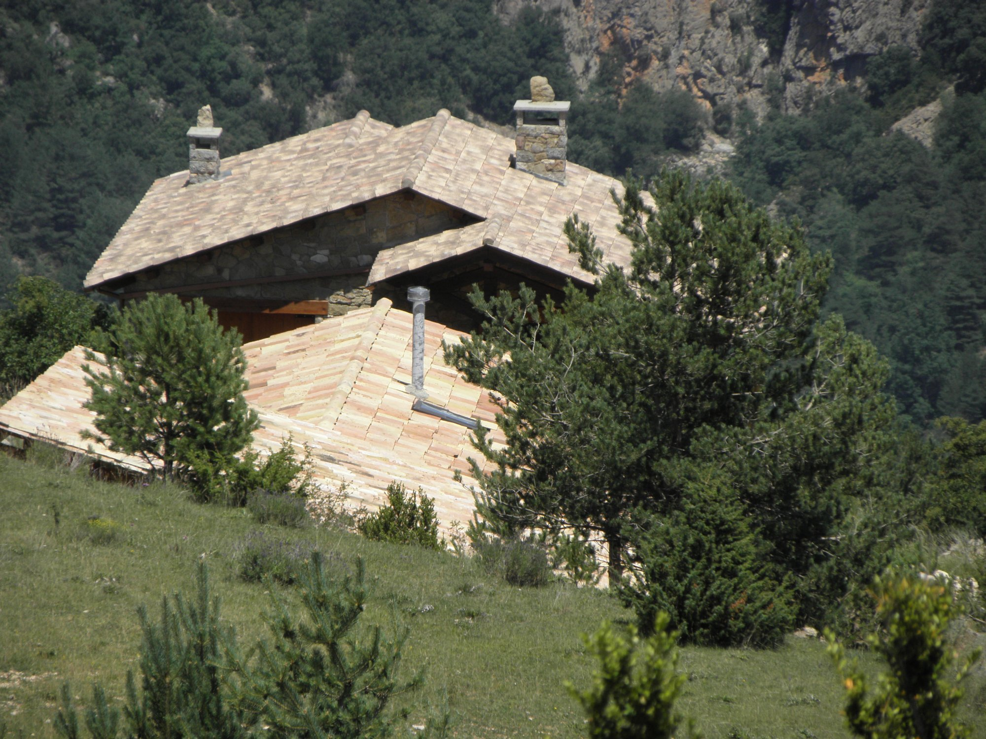 La masia de Ca l'Andal (municipi de la Coma i la Pedra), al poble de la Coma, a la Vall de Lord (Solsonès)